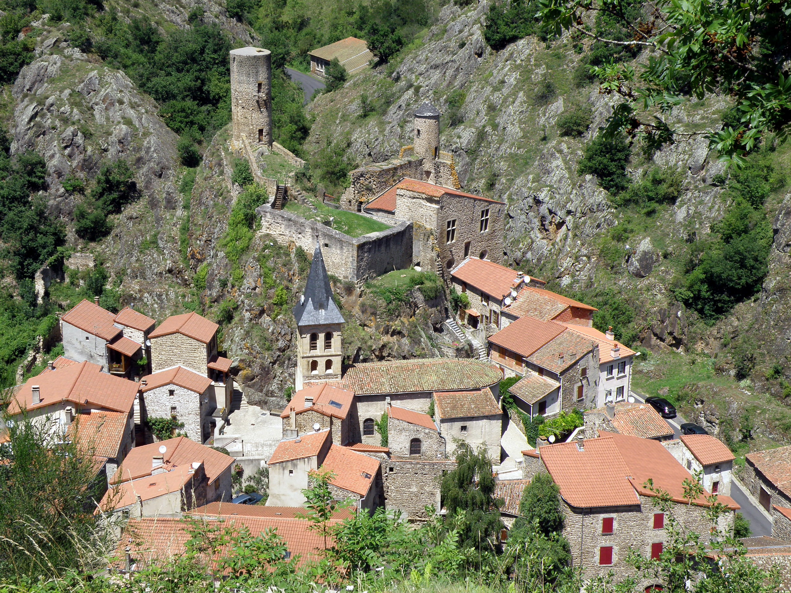 Saint-Floret, comm. du Puy-de-Dôme (Auvergne, France).